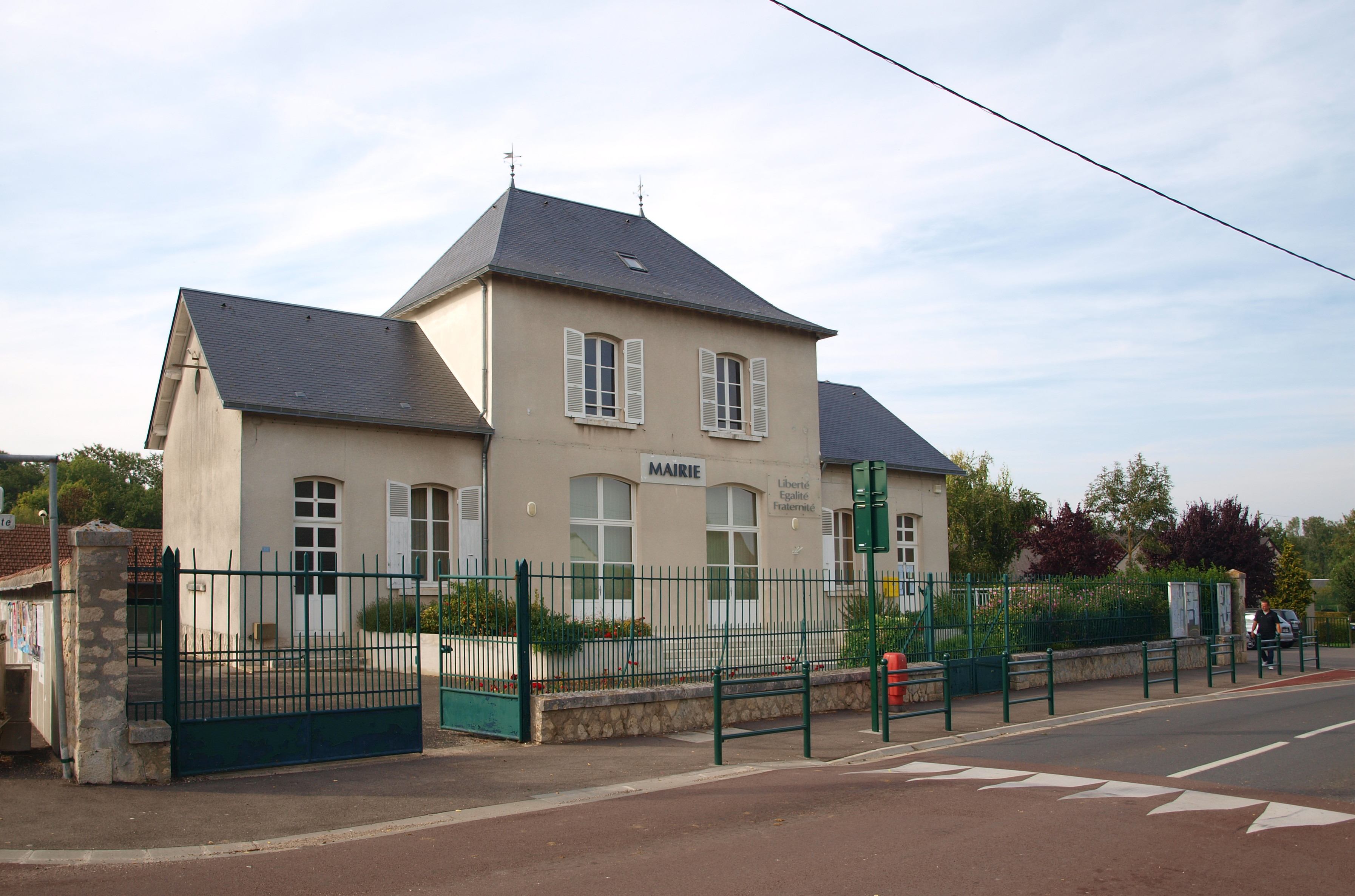 Préfontaines (Loiret, France) ; mairie